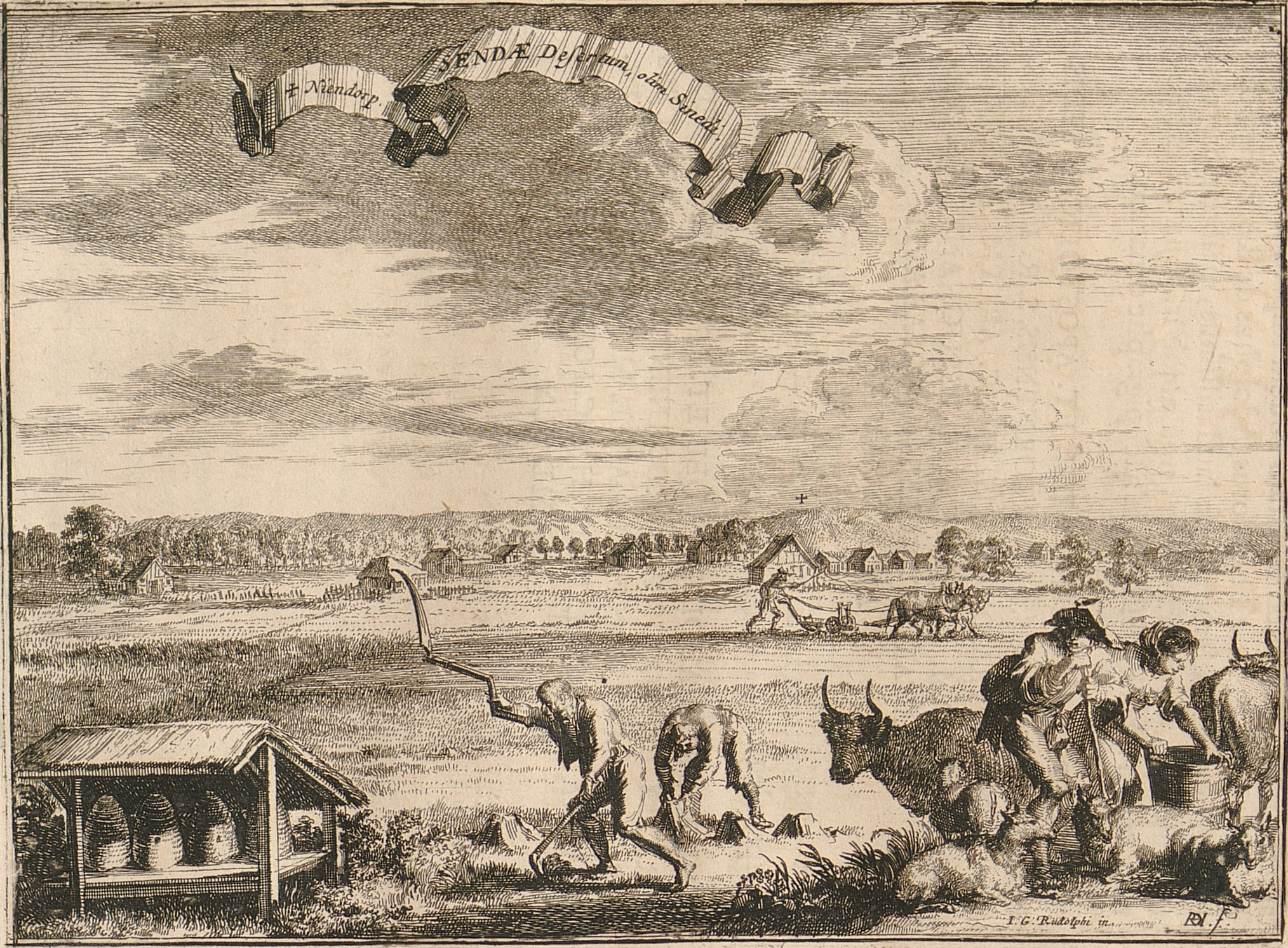 Monumenta Paderbornensia S.232: Niendorp („Neues Dorf“, heute Hövelhof) in der Senne Identifizierung der Höfe durch Johannes Buschmeier in: Hövelhof : Bilder zur Geschichte.